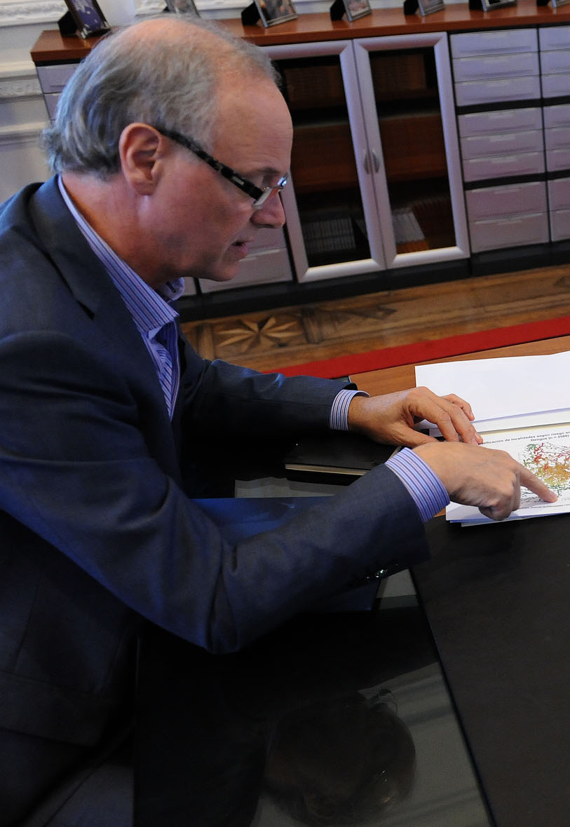 Daniel Gollán recibido por Aníbal Fernández